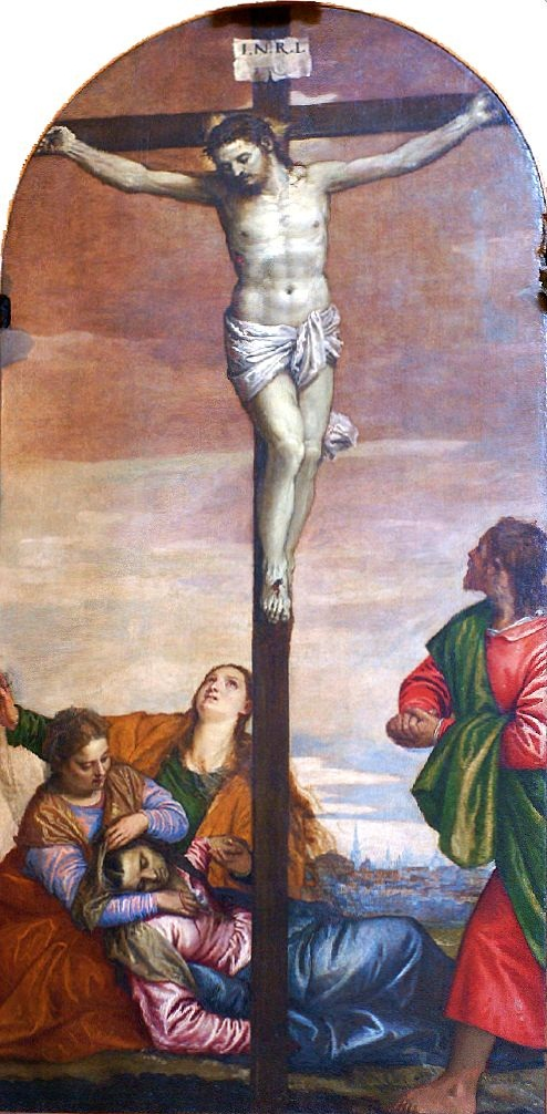 Crocifissione